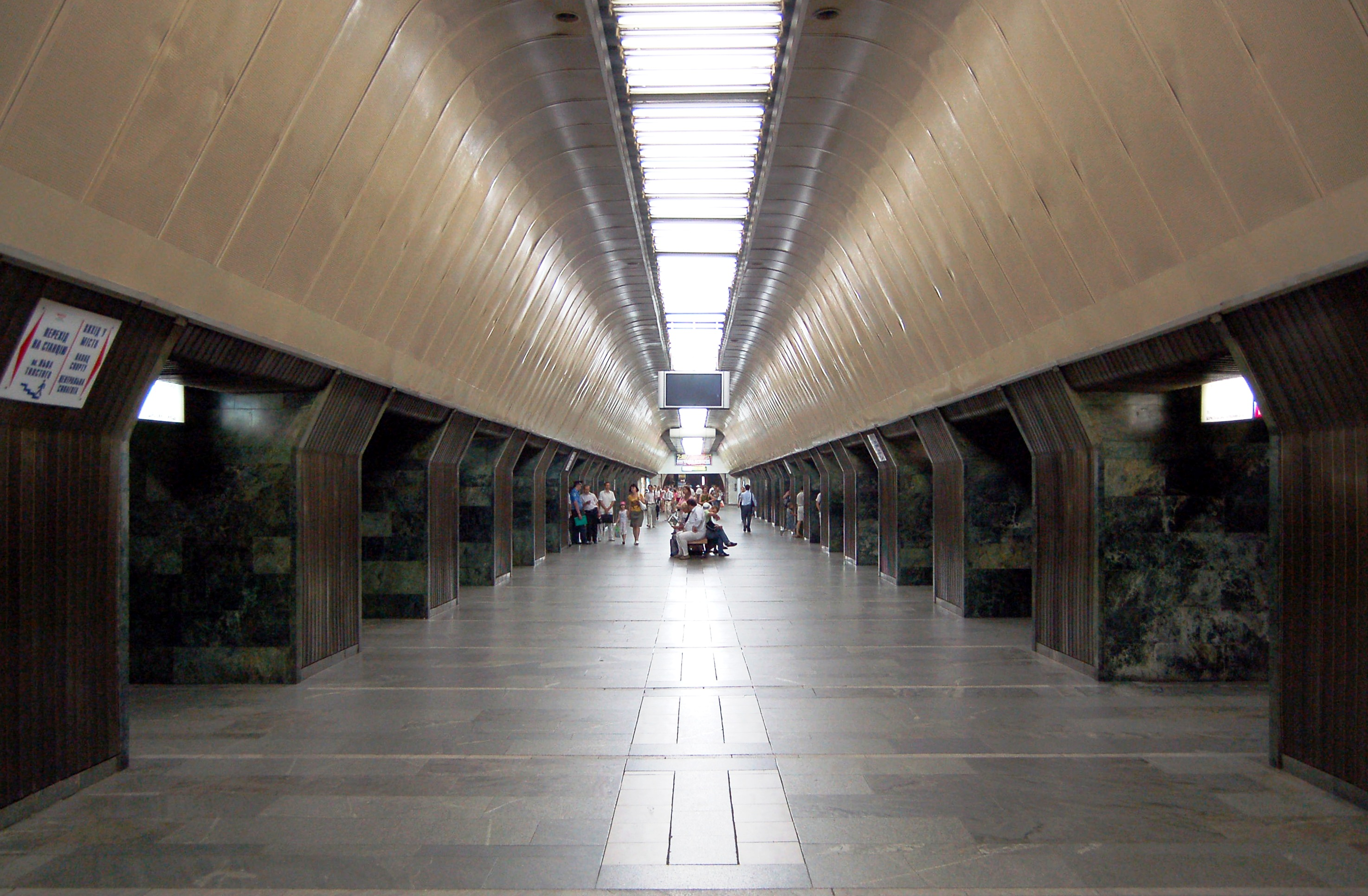 Cтанция метро «Дворец спорта», центральный зал